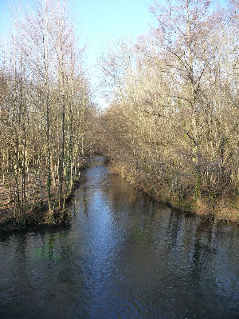 Le Cléry, traversant la commune de GRISELLES